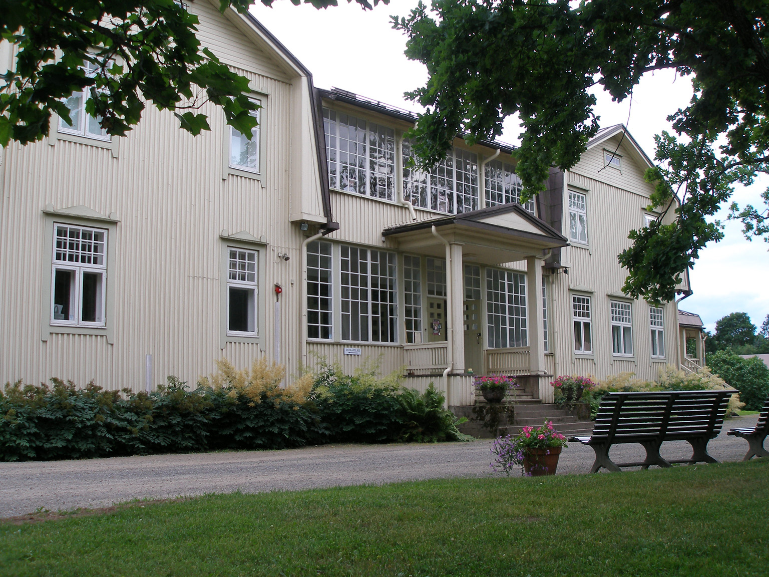 Voipaala Manor